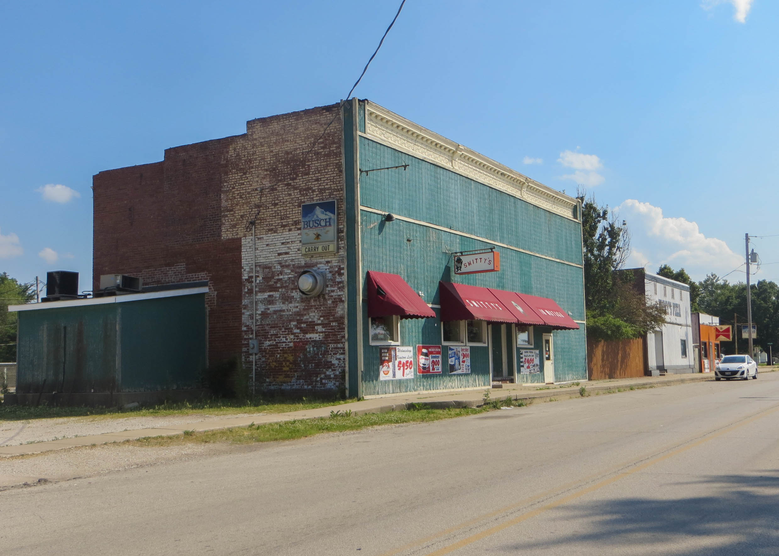 Wataga, Illinois.